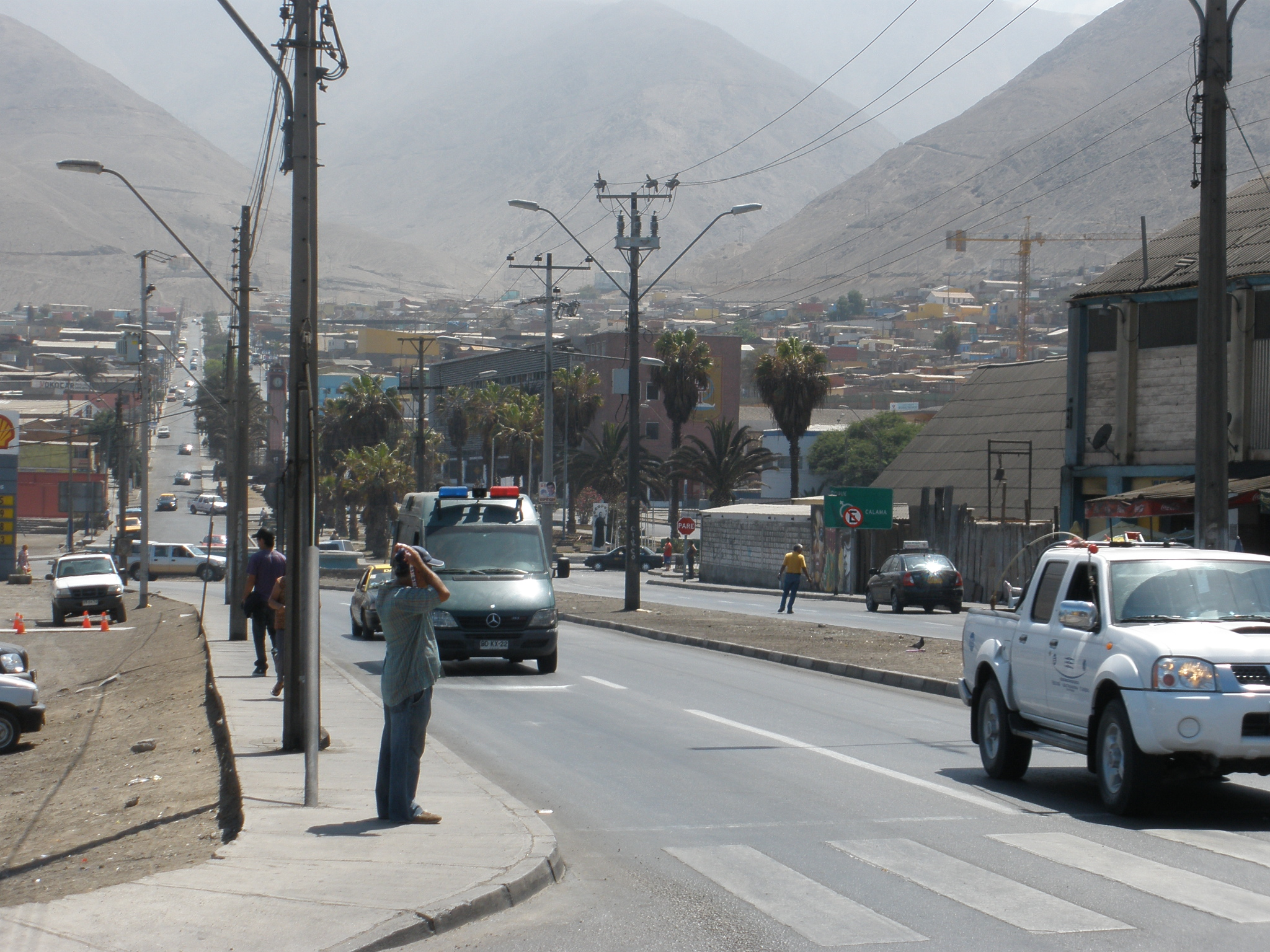 Tocopilla, Región de Antofagasta, Chile